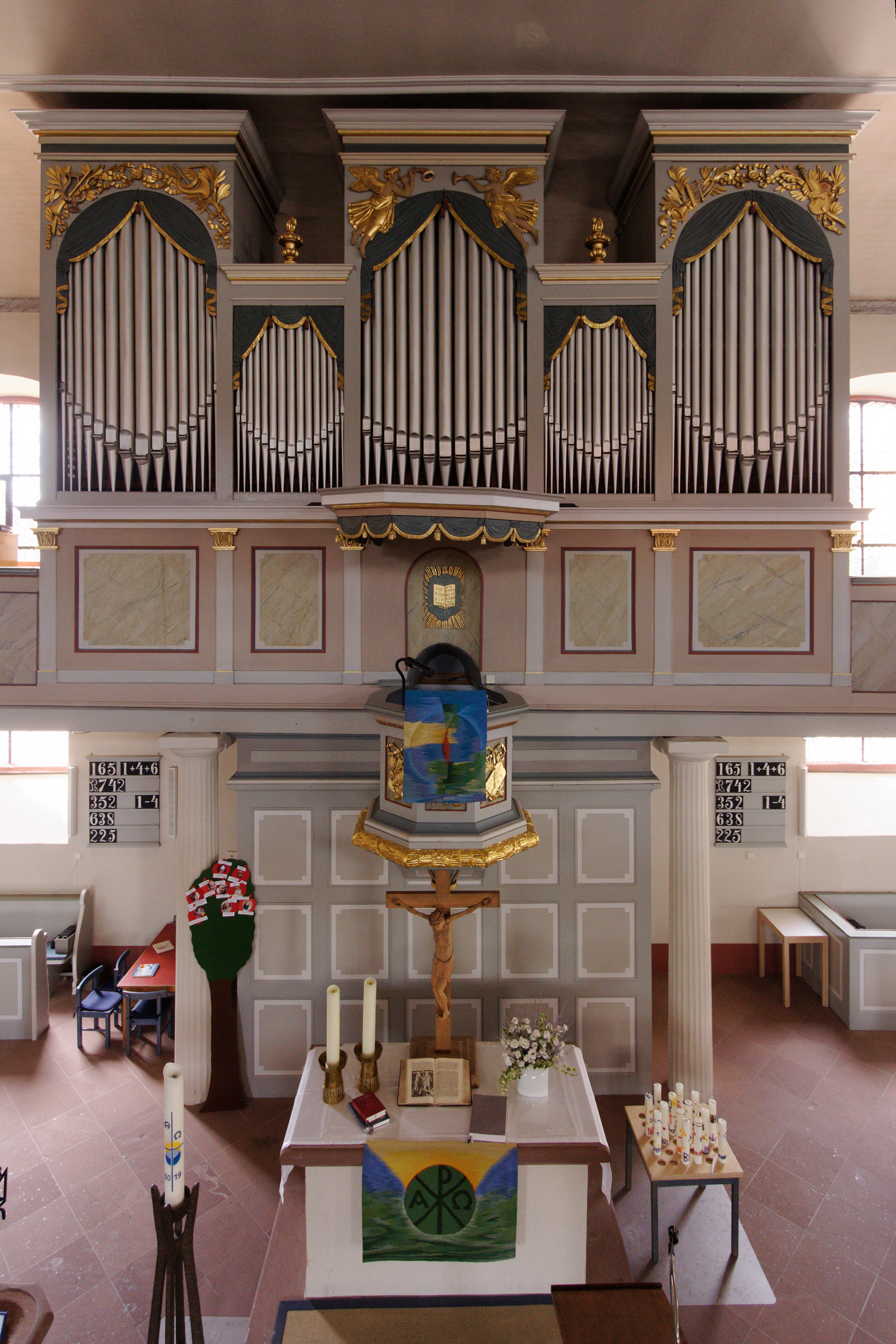 Evangelische Kirche in Dudenhofen, einem Stadtteil von Rodgau (Hessen): Orgel, Kanzel und Altar sind untereinander angeordnet.